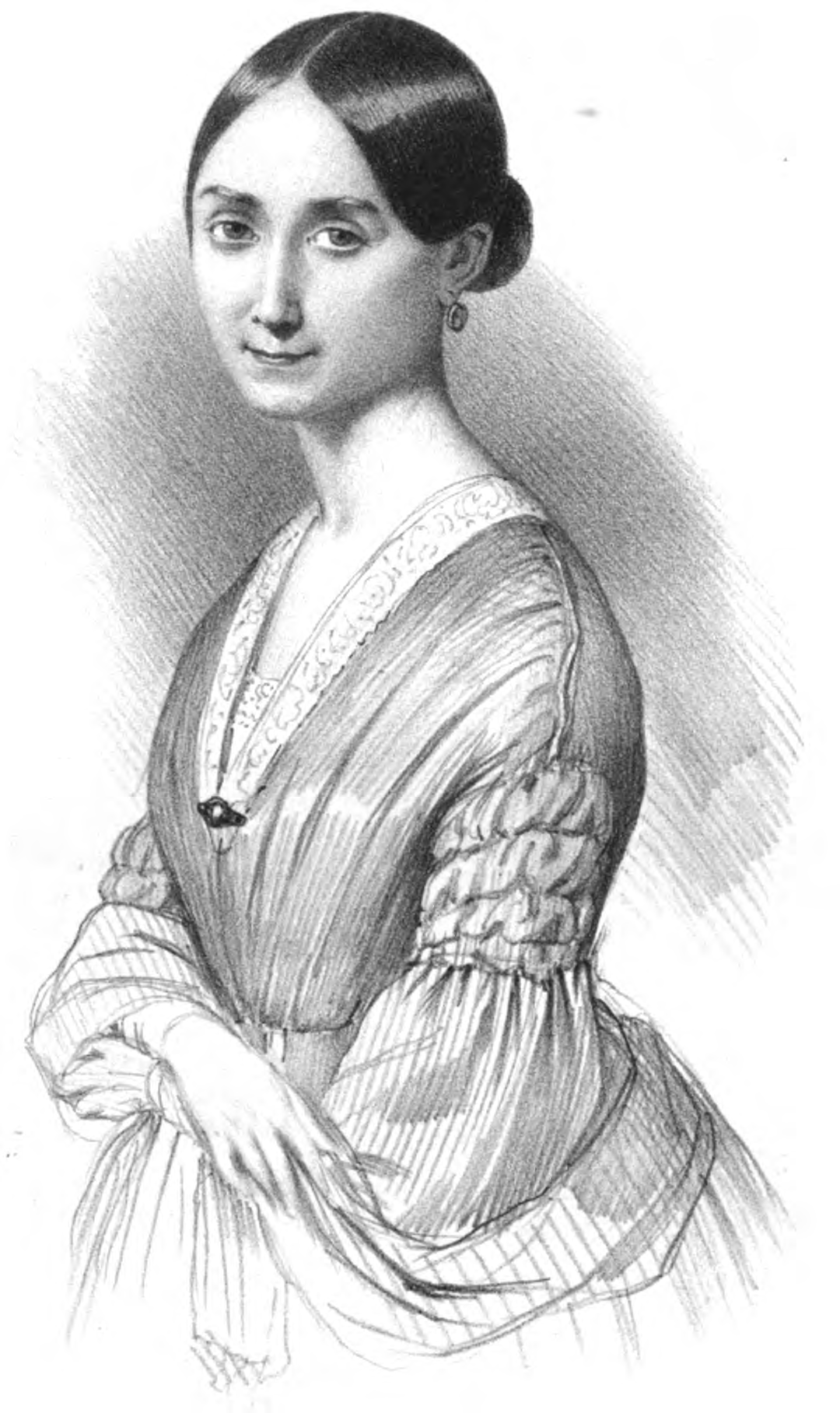 Adèle-Louise-Pauline Leroux est une danseuse française née à Paris le 19 août 1809 et morte le 5 février 1891 à Paris 9e. Élève d'Auguste Vestris et de Jean-François Coulon, elle fait partie du Ballet de l'Opéra de Paris de 1826 à 1837, puis de 1840 à 1844 pour remplacer des célébrités étrangères comme Marie Taglioni ou Fanny Elssler, alors en pleines tournées internationales.